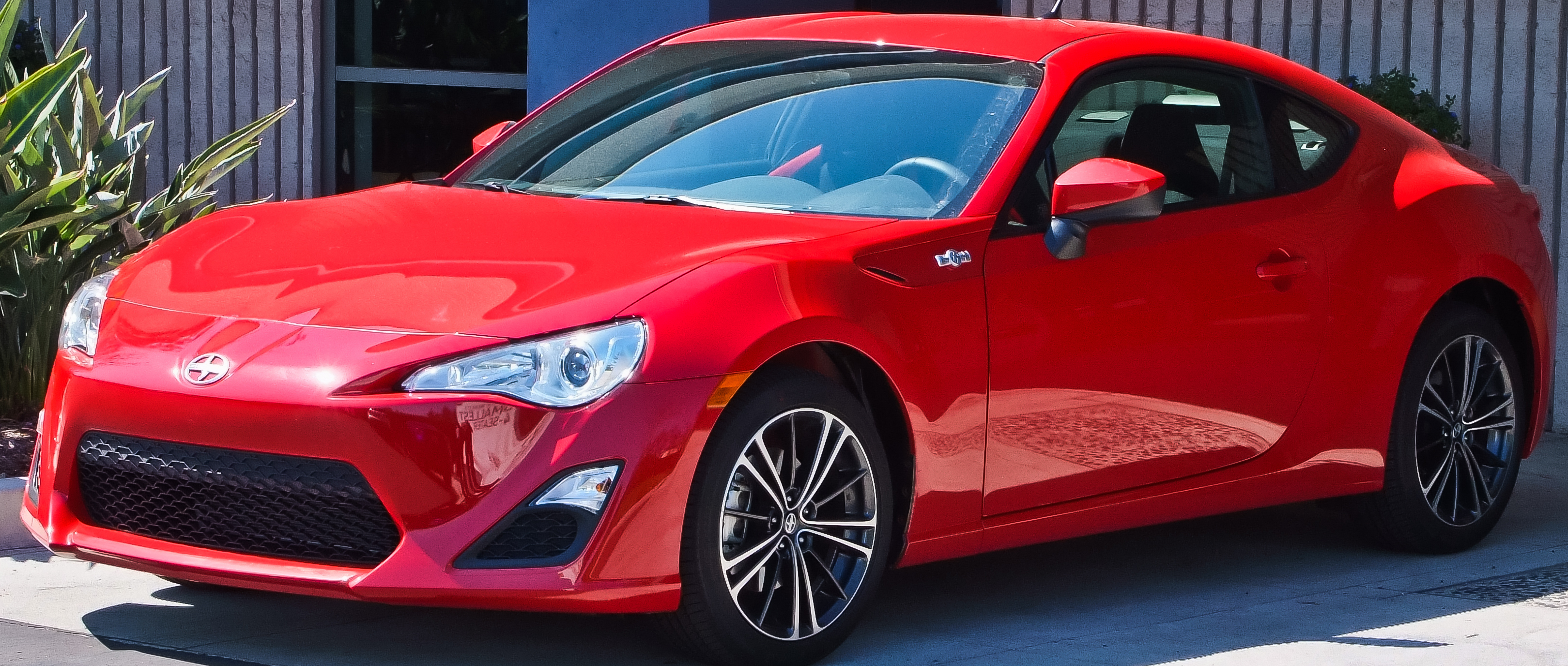 Scion FR-S